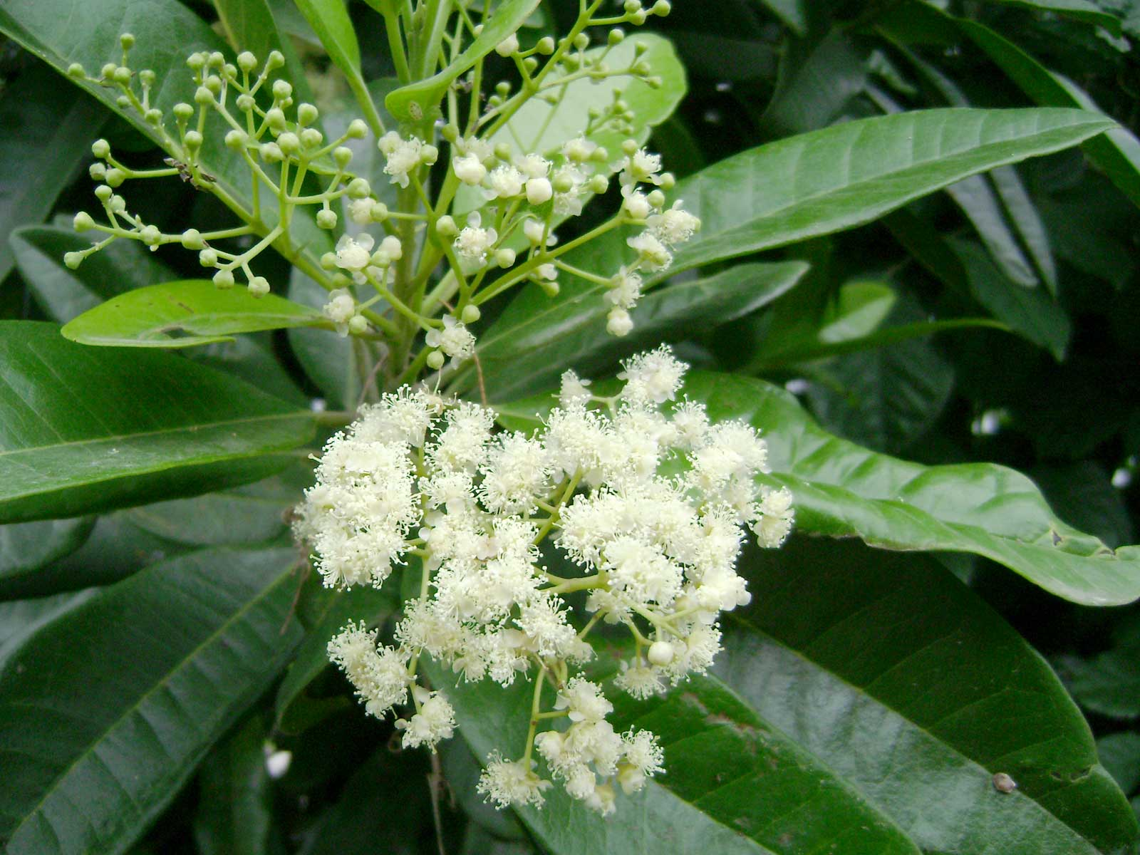 Pimenta dioica, flowers; {sipaisi} in a Tongan garden